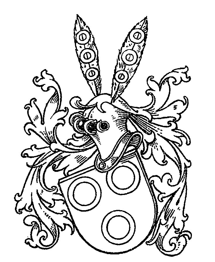 Wappen des Osnabrücker Patriziergeschlechts Ertmann